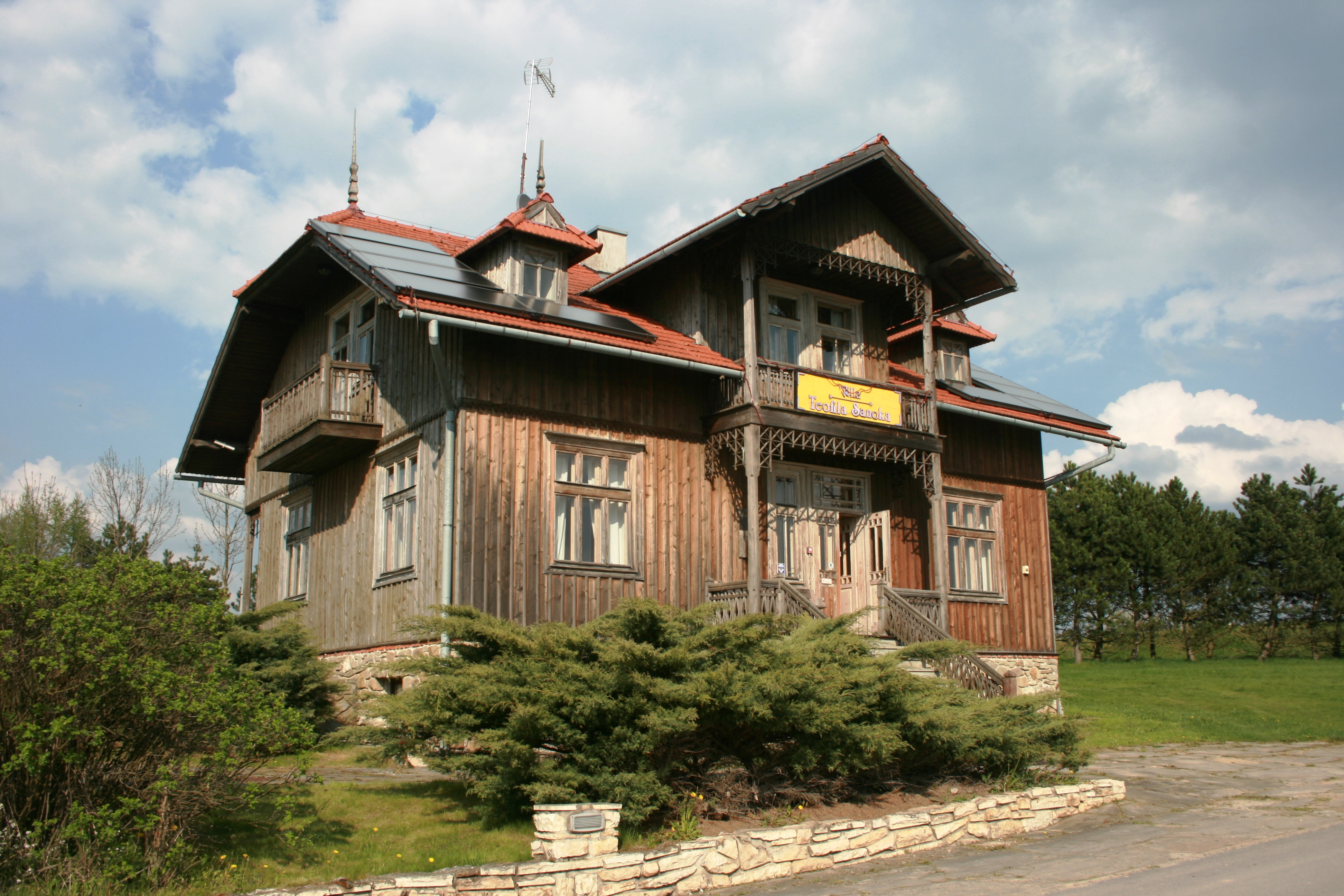 Willa Sanoka w Osadzie Czorsztyn - widok po południowego zachodu